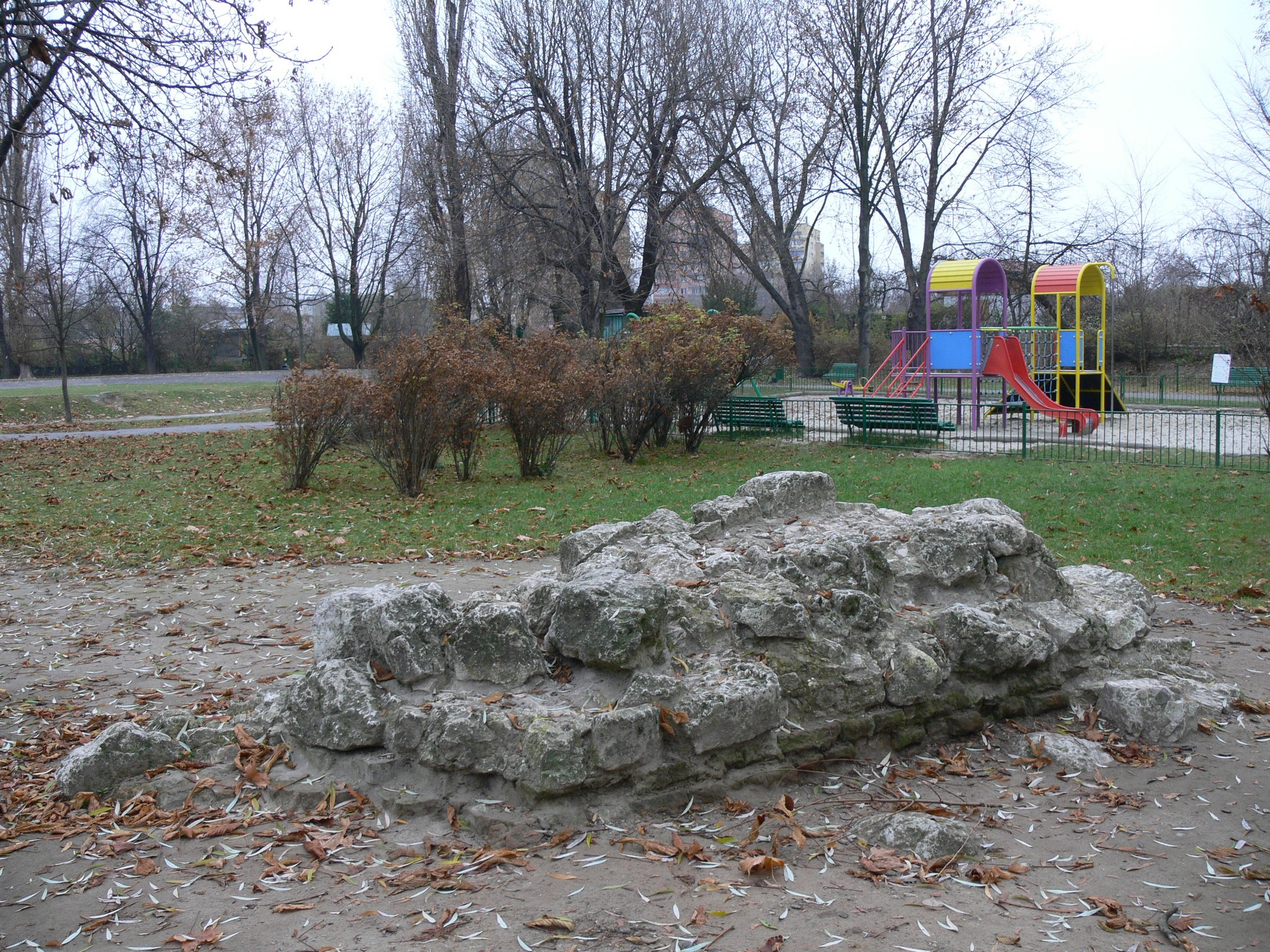 Park im. St. Wyspiańskiego w Krakowie - plac zabaw i ruiny